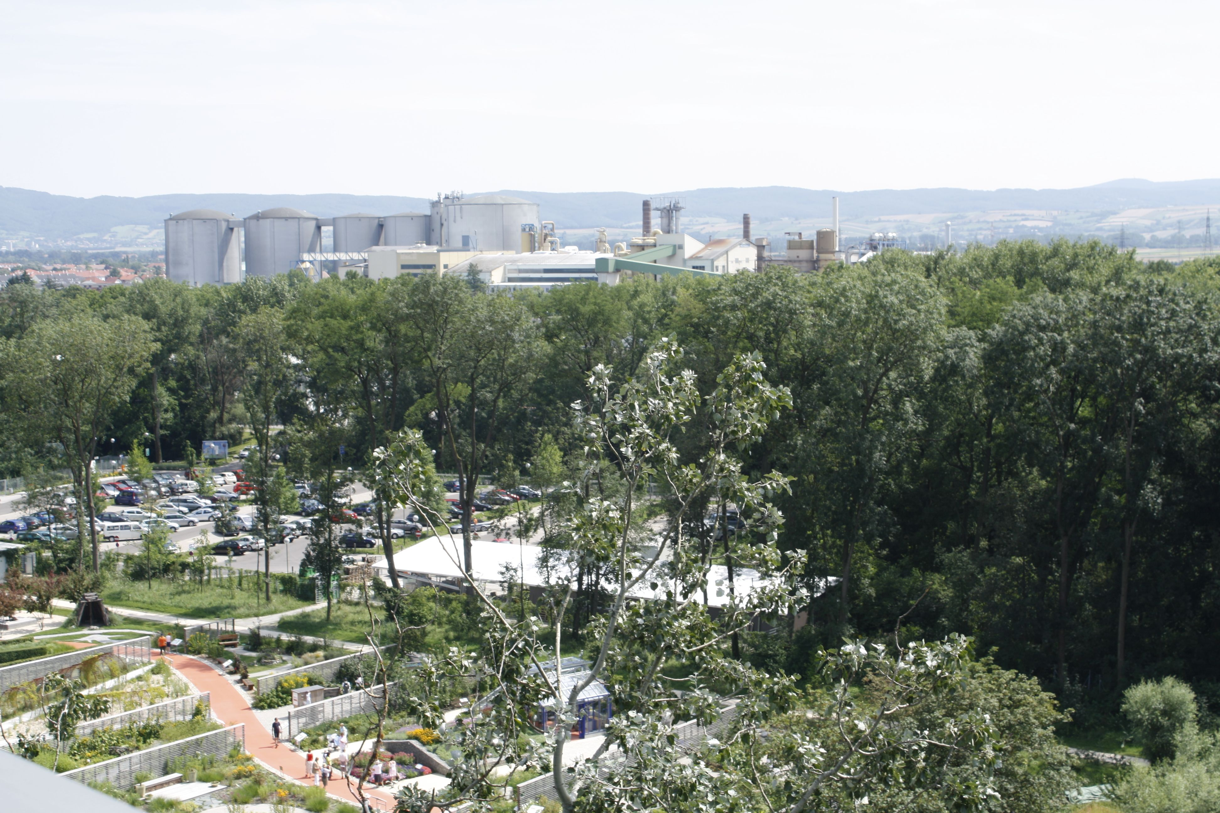 NÖ Landesgartenschau Garten Tulln 2009 in Tulln an der Donau in Niederösterreich